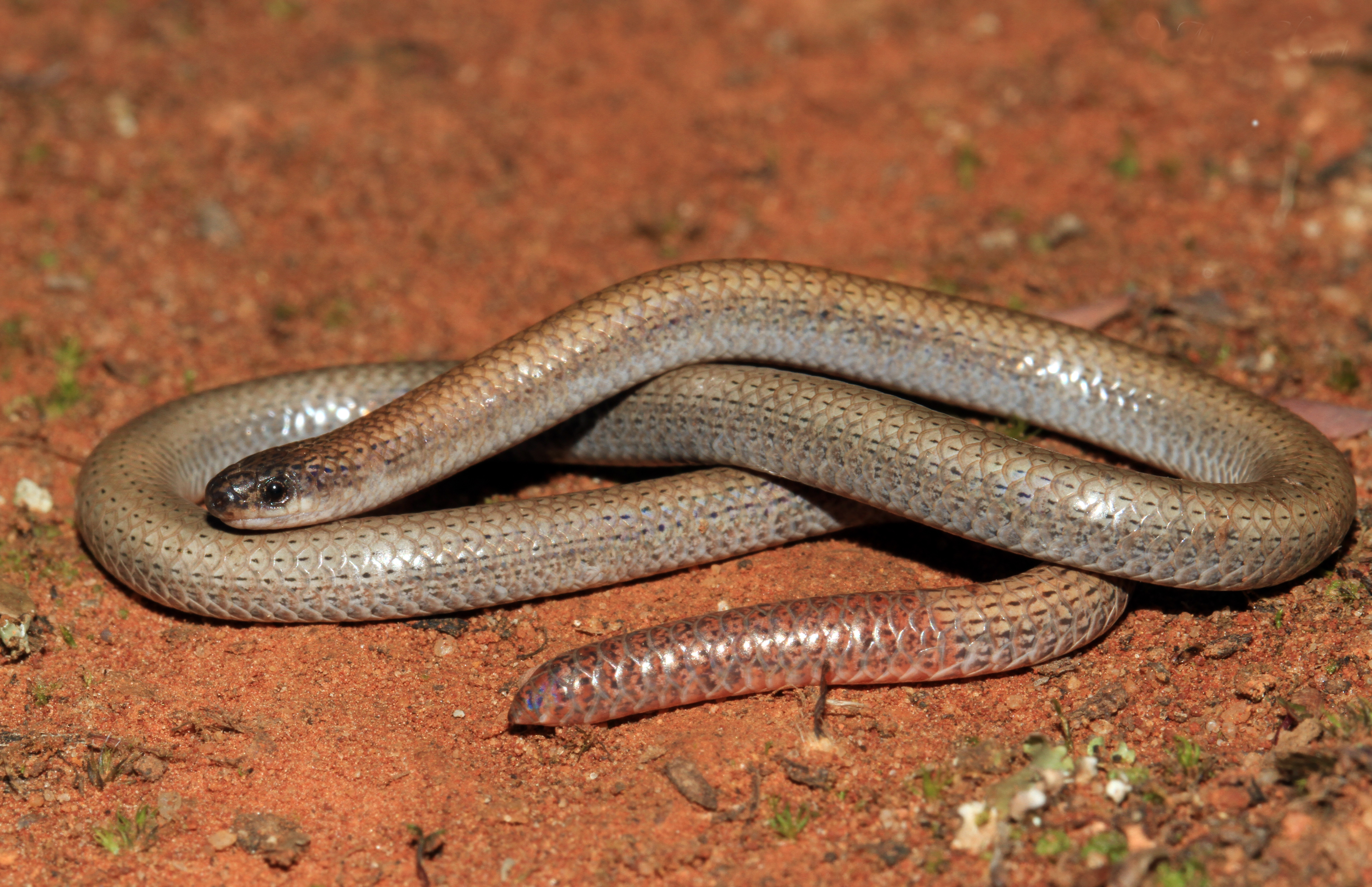 Bendigo district, Vic.